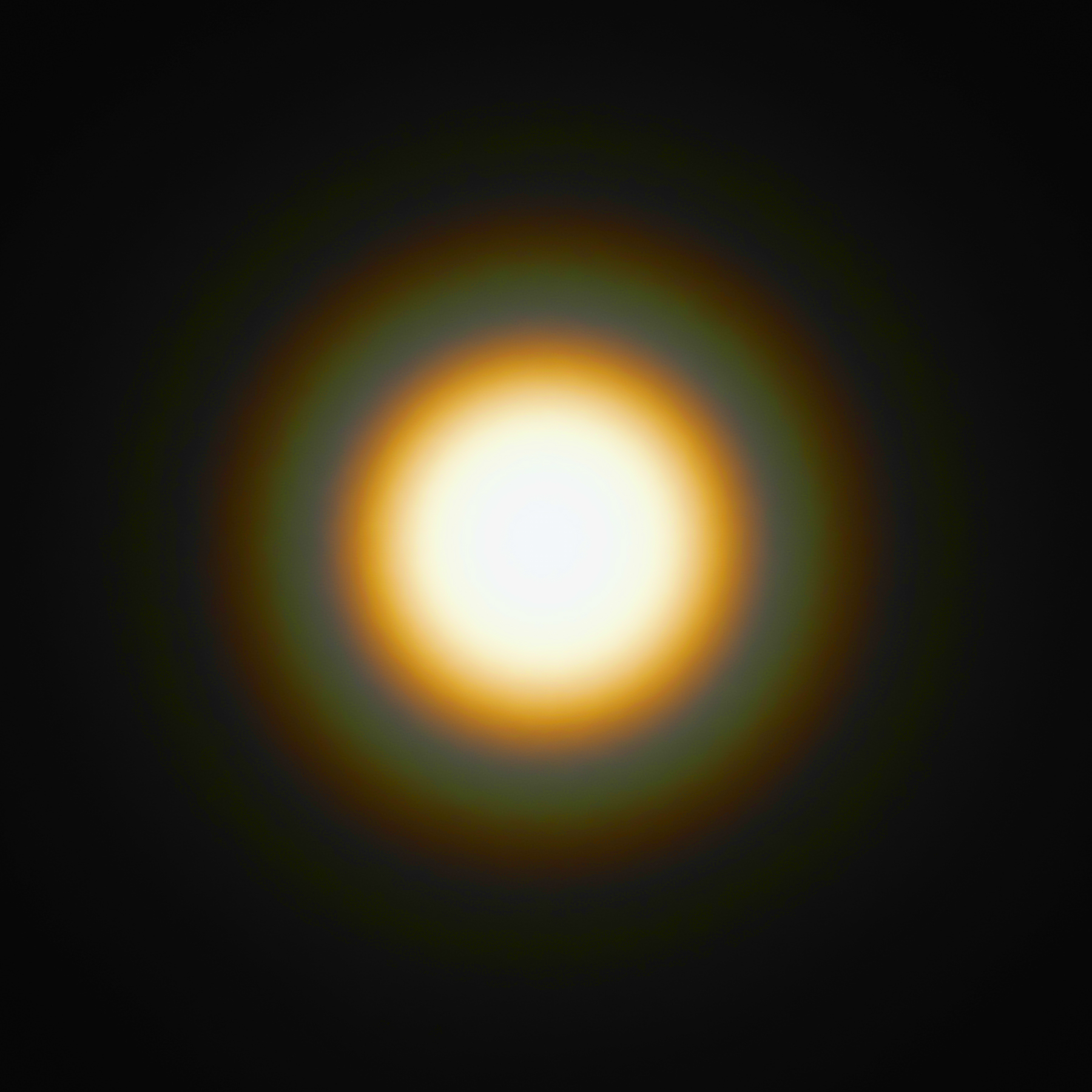 Beugung des Lichts der Sonne an einer kreisförmigen Lochblende mit 90 Mikrometern Durchmesser im Abstand von 58 Millimetern von der Bildebene - je kürzer die Wellenlänge, desto geringer werden die entsprechenden Farbanteile gebeugt